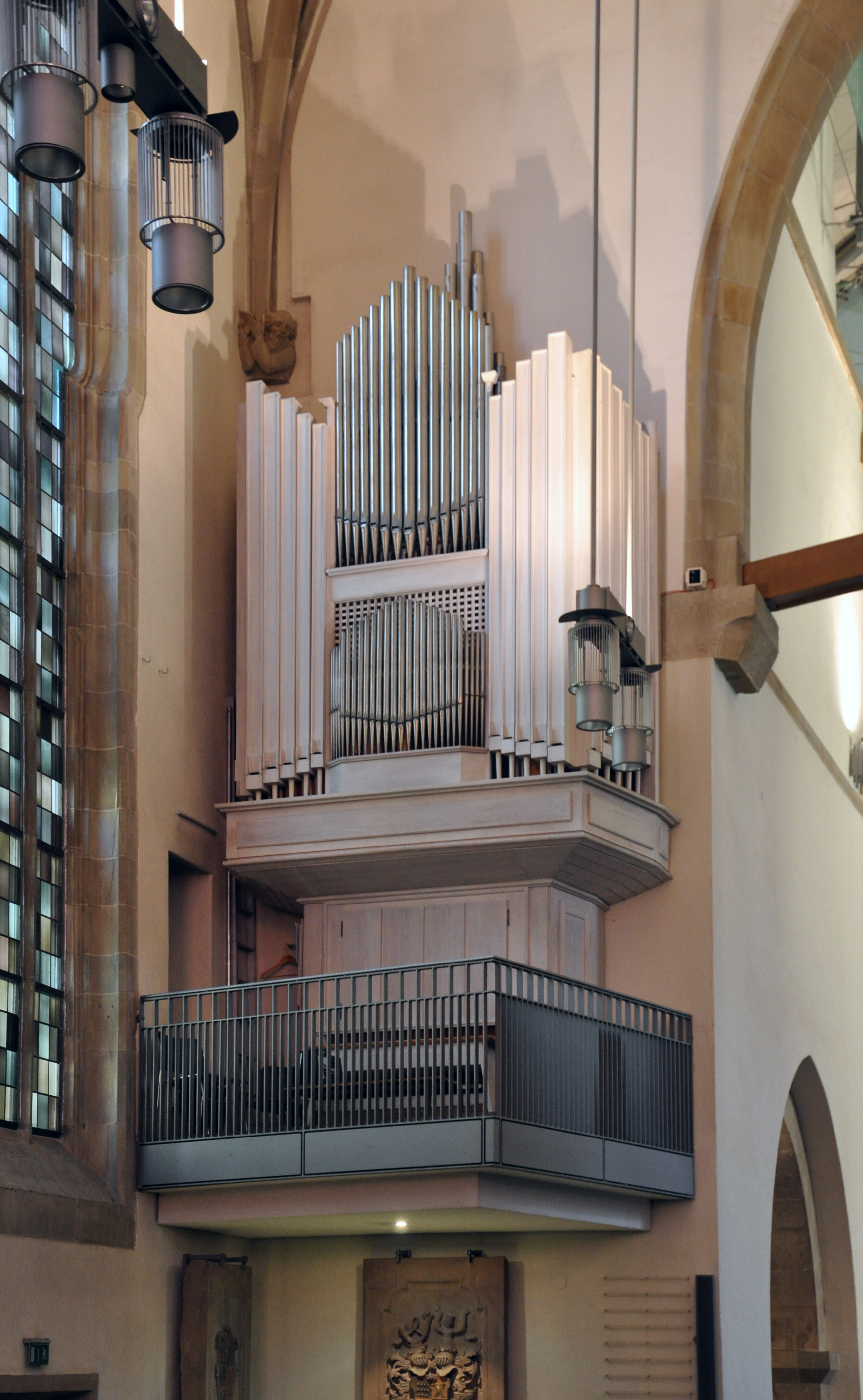 Stuttgart, Stiftskirche, Chororgel (Weigle/Mühleisen, 1953–2004). Links oben: Bruststück als Gewölbeanfänger.